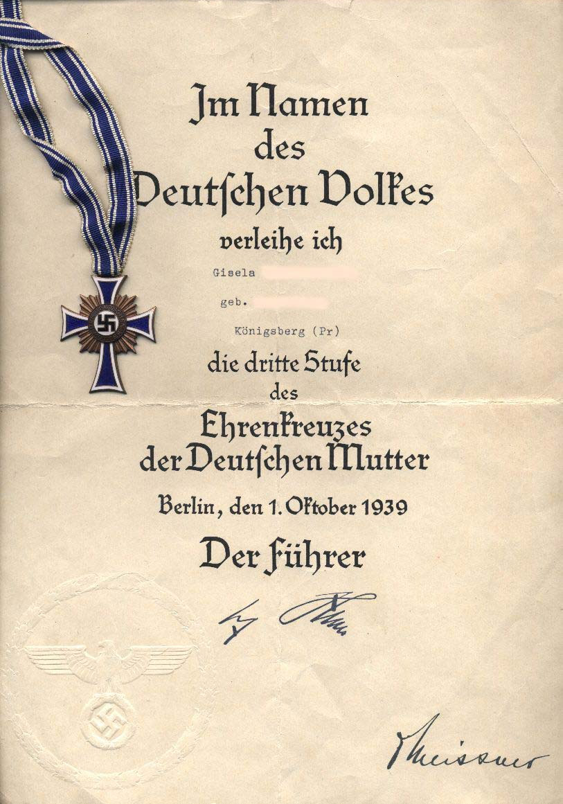 Mutterkreuz 3. Stufe, 1940